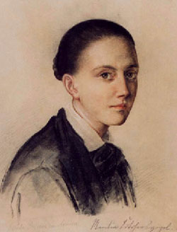 Gisela von Arnim, letzte Tochter Achims und Bettinens von Arnim